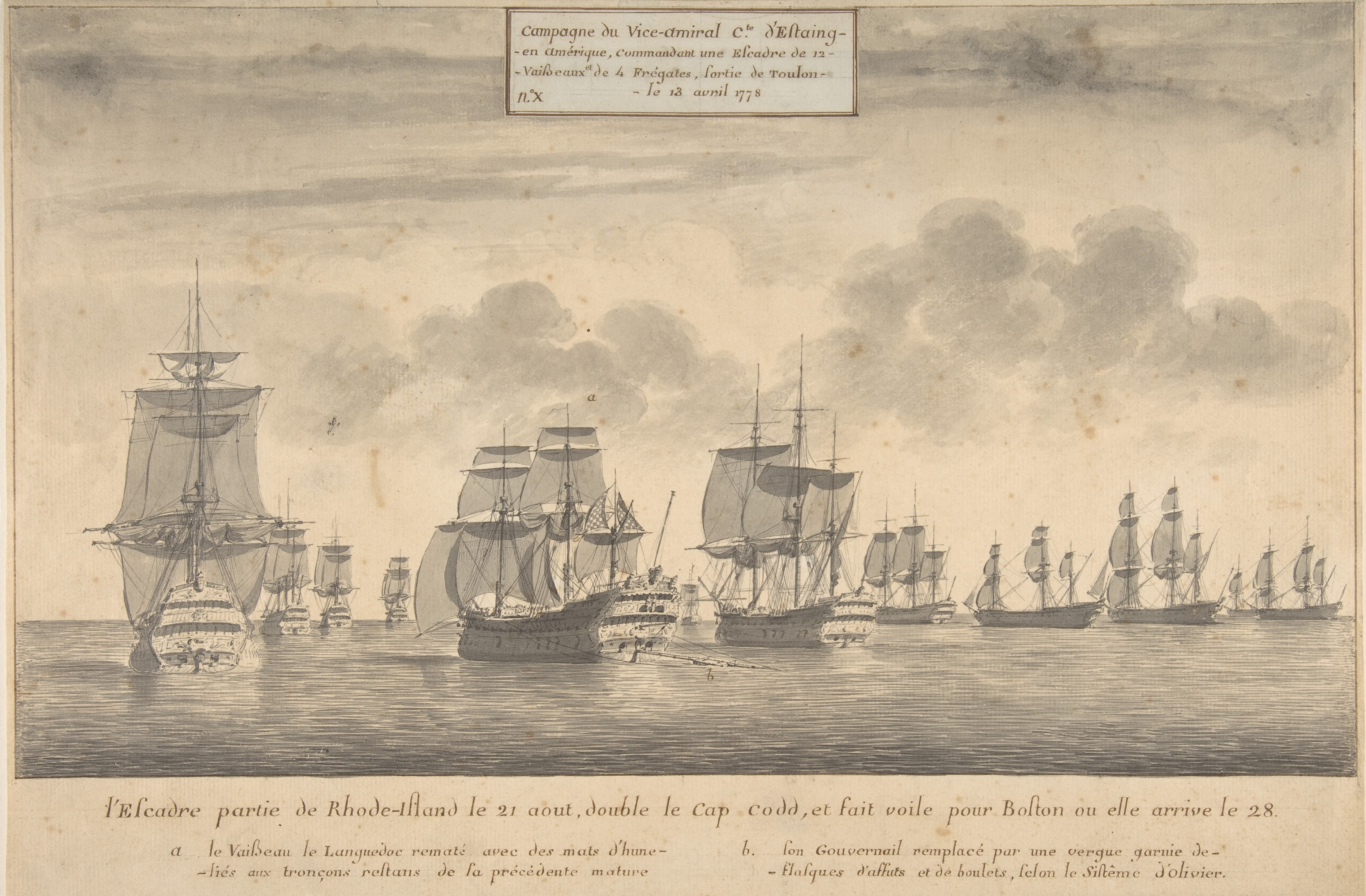 Dessin de Pierre Ozanne, artiste ayant embarqué avec la première escadre française intervenant en Amérique en 1778. au centre, le vaisseau le Languedoc réparé après le tempête et son combat contre un navire anglais.